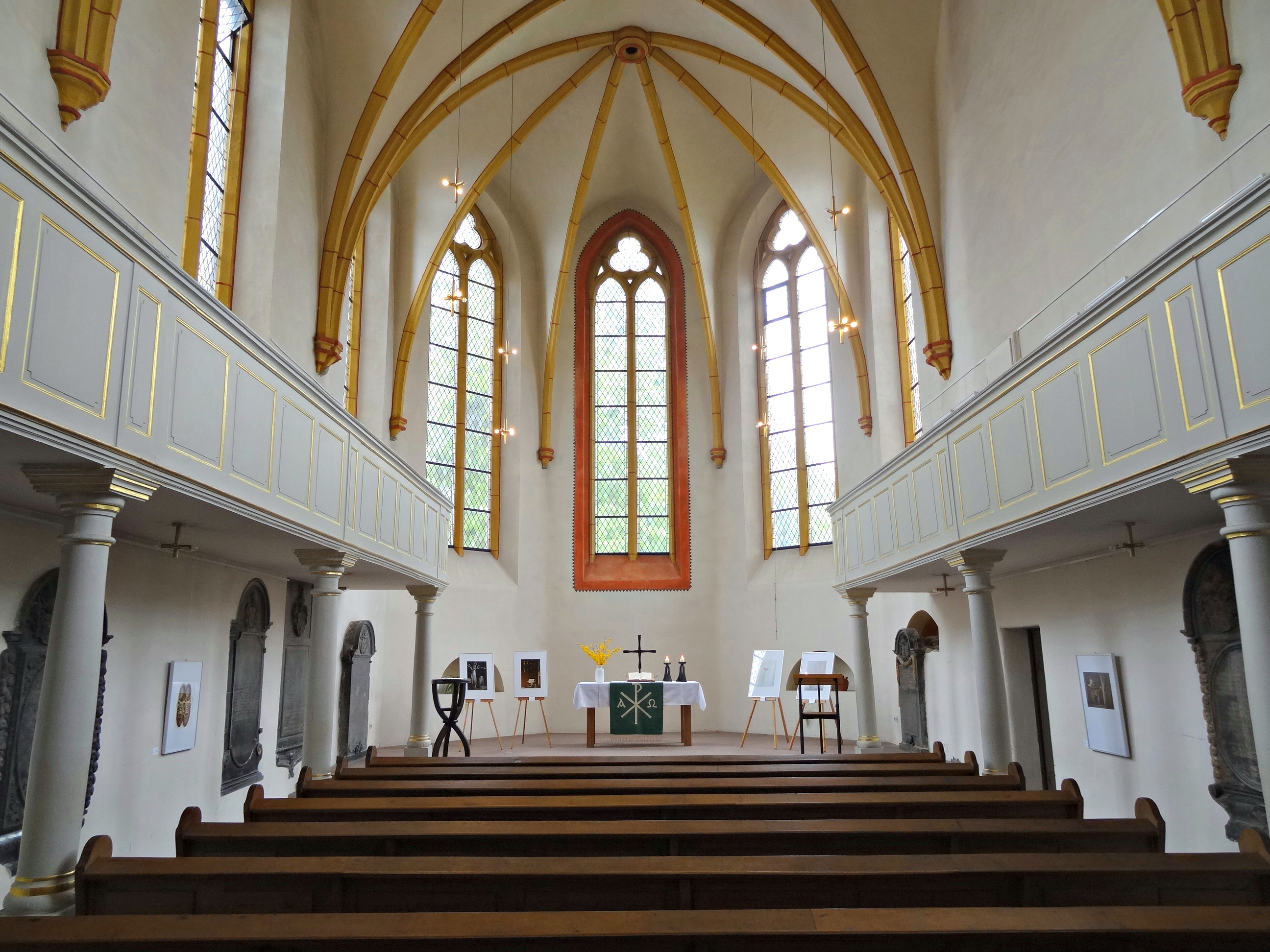 Franziskanerkirche (Wetzlar)